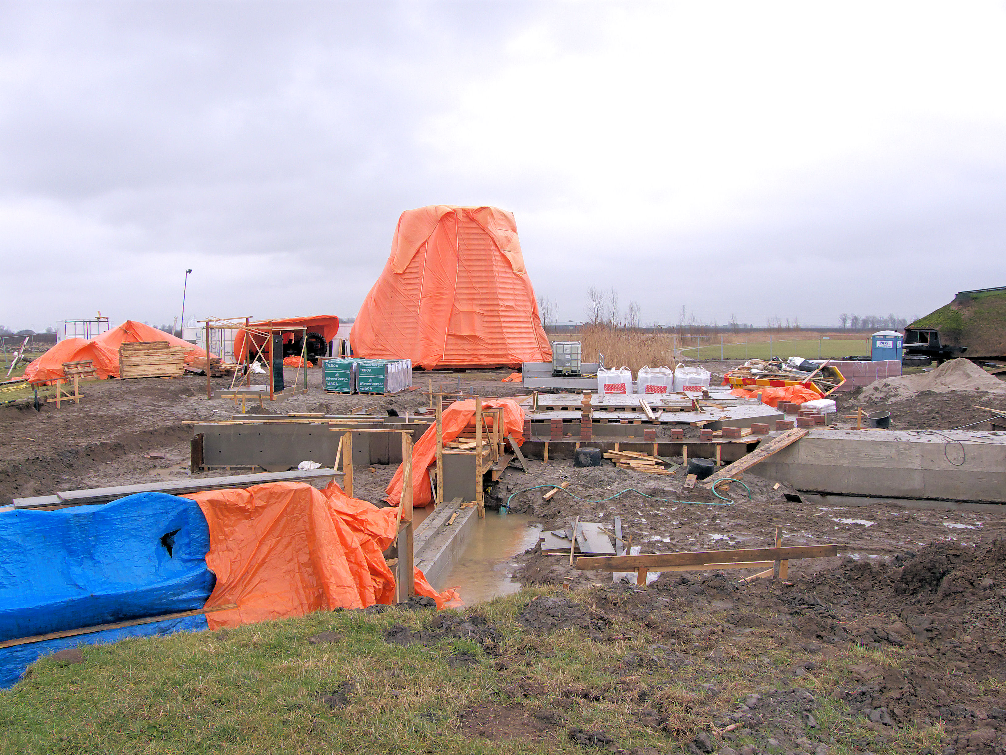 Molen van Wadenoijen, blaffer (zelfwerkende keer- of spuisluis)